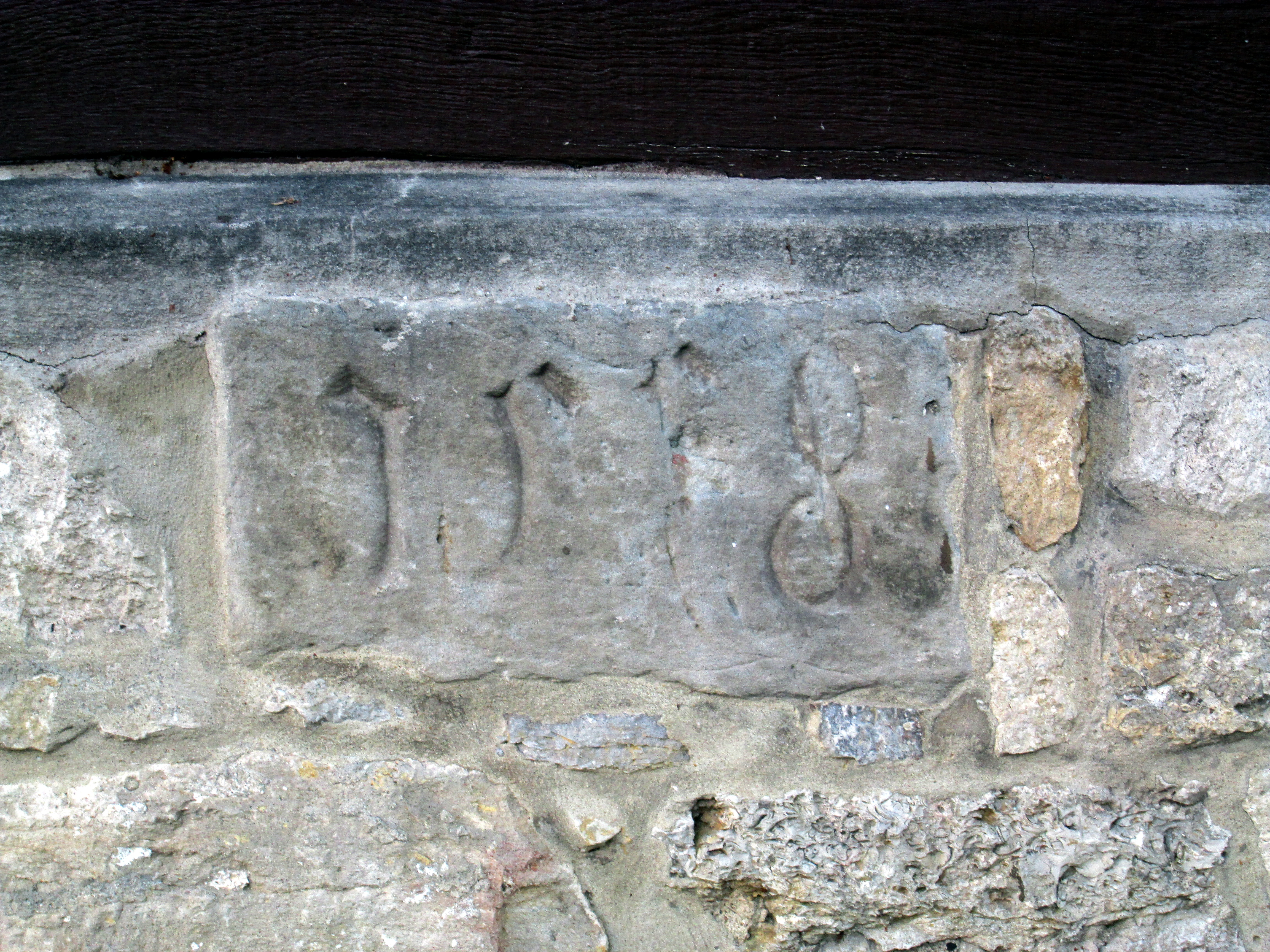 Haus Böttrich, Sternstr. 13 in Warburg